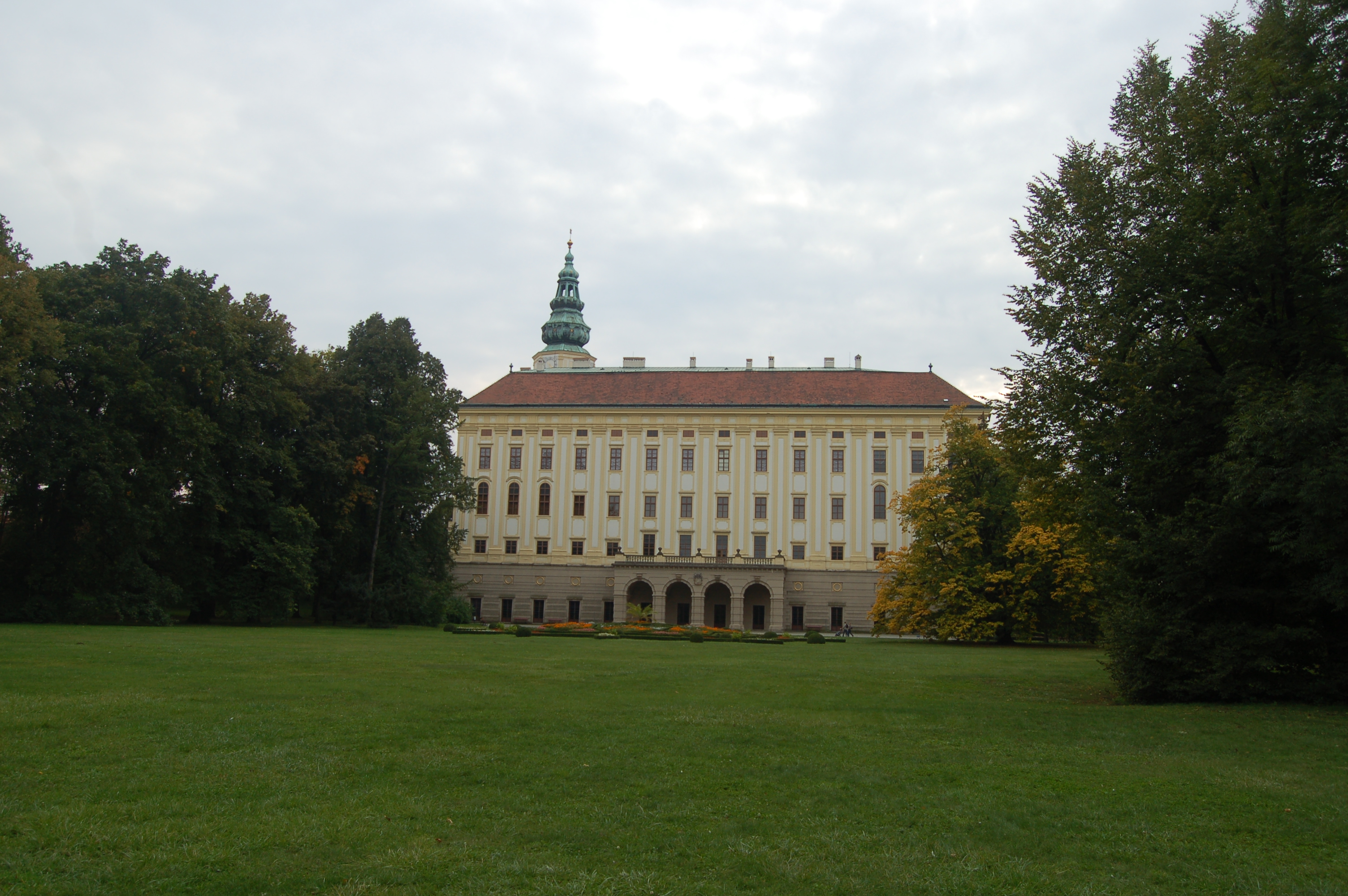 Arcibiskupský zámek v Kroměříži, pohled z Podzámecké zahrady